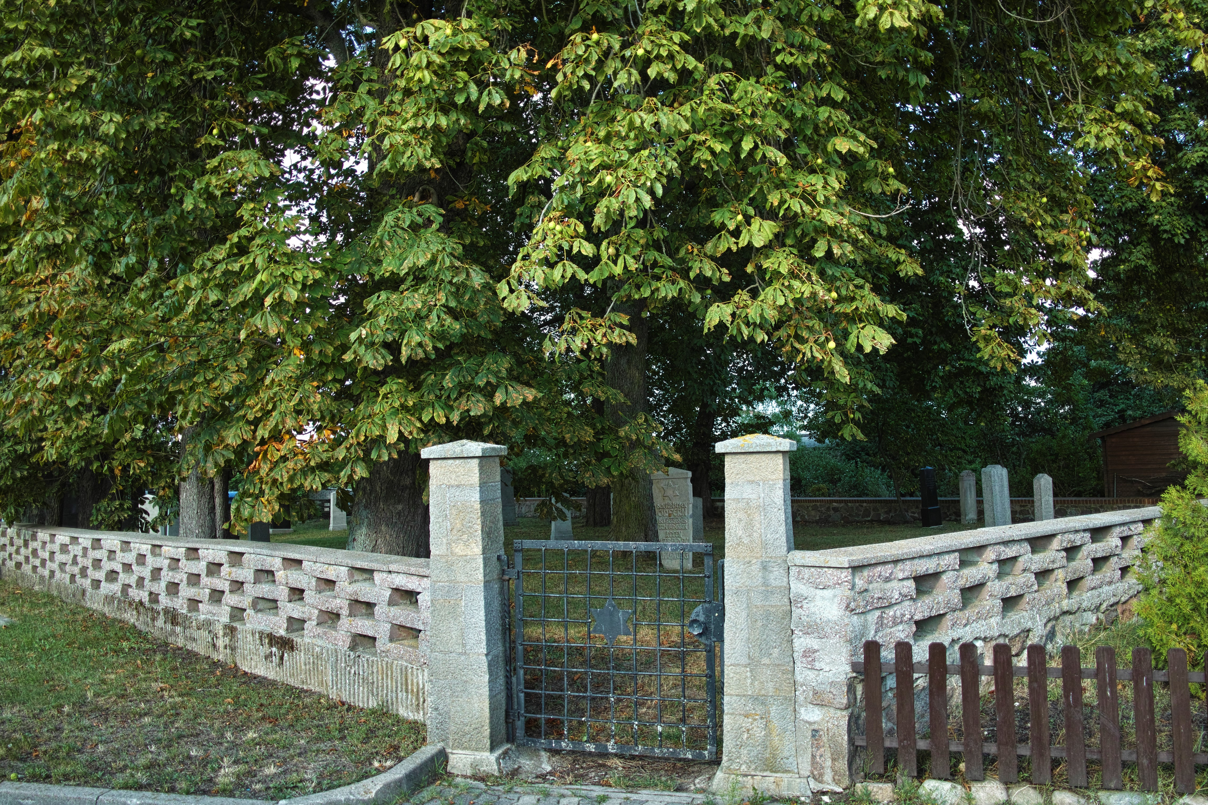 Anklam, Jüdischer Friedhof (Anklam). Wikidata has entry Q1716055 with data related to this item.